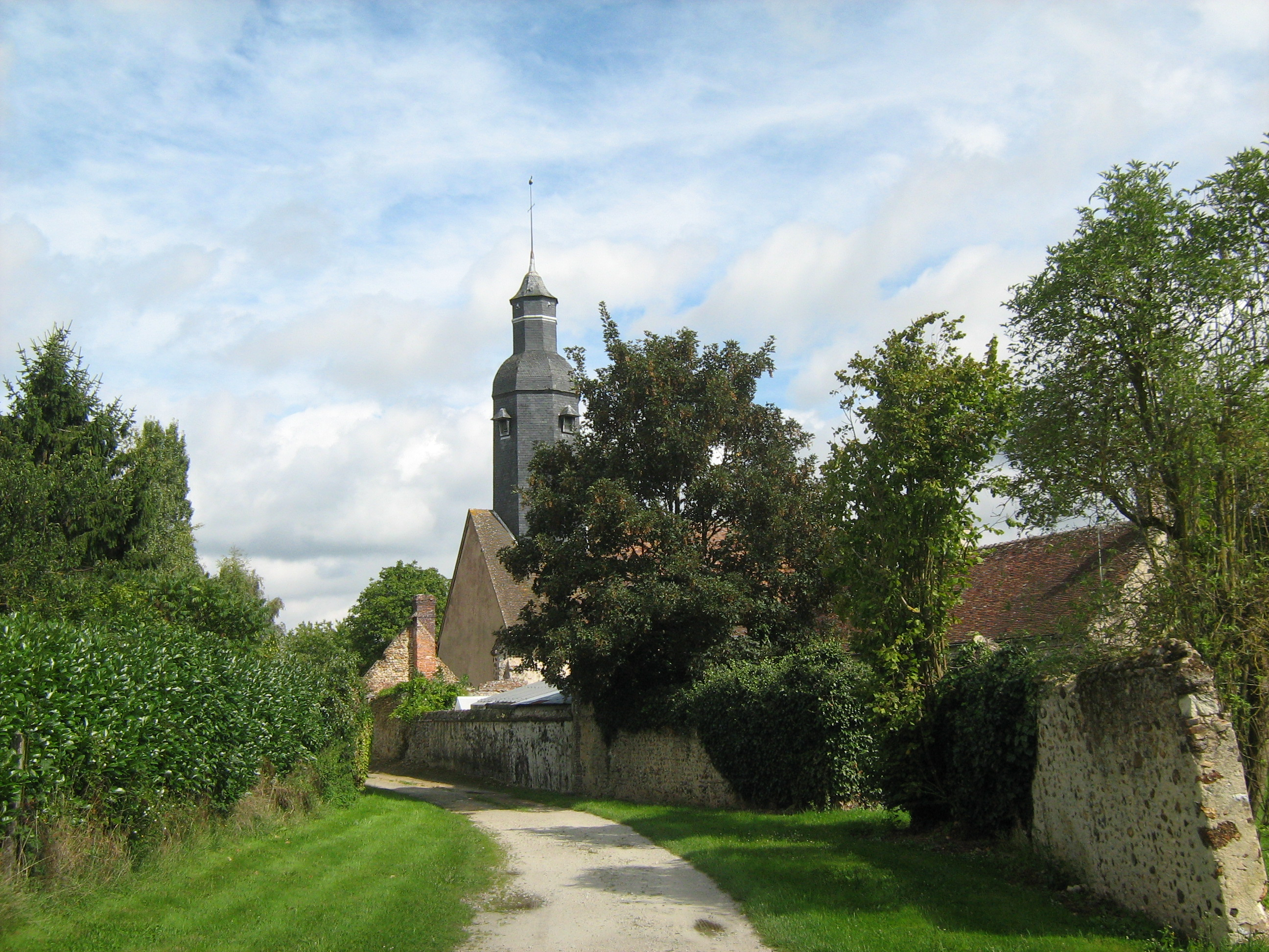 Vu large de l'église Saint-Laurent des Menus